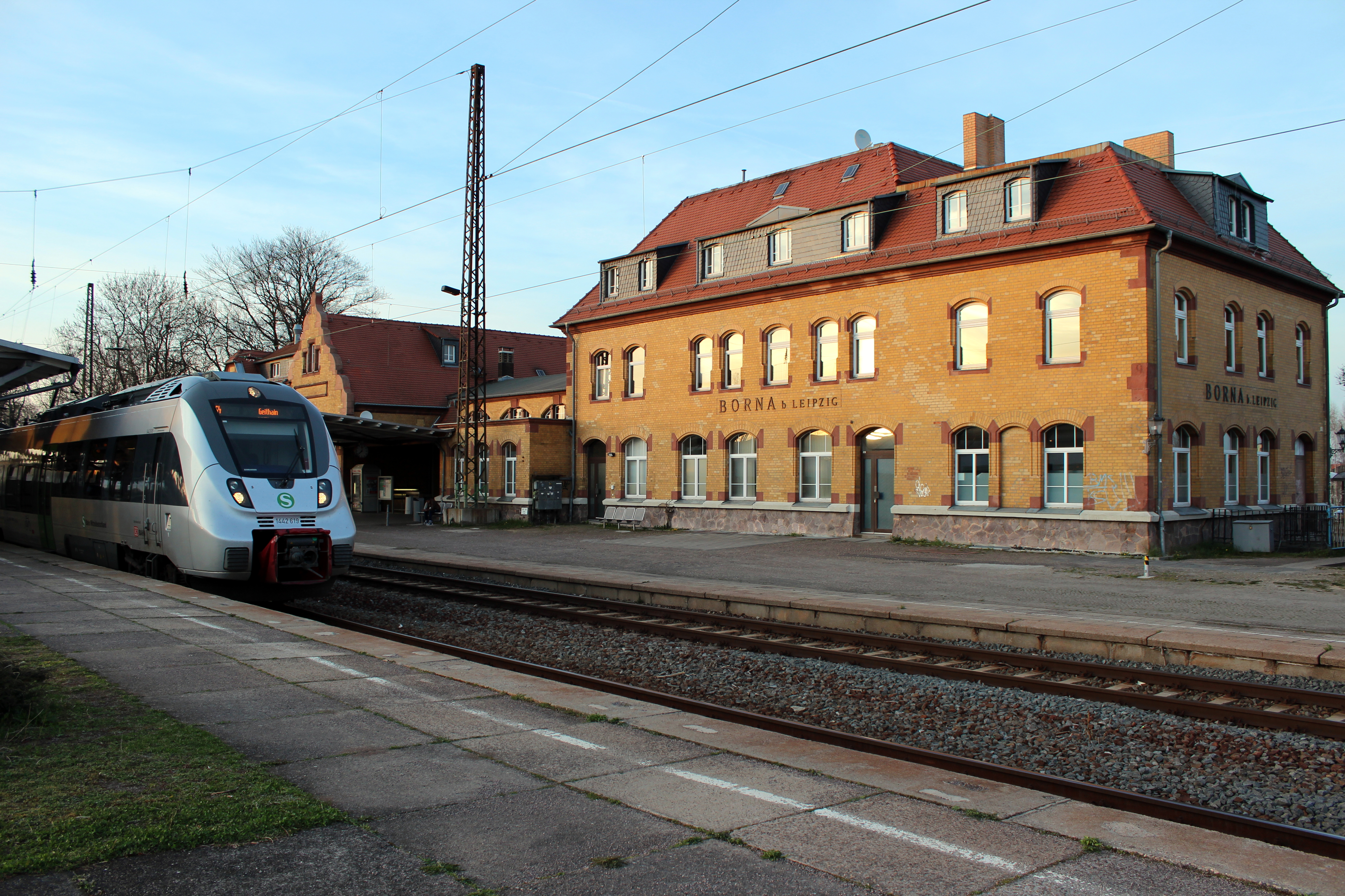 Bahnhof Borna (b Leipzig)